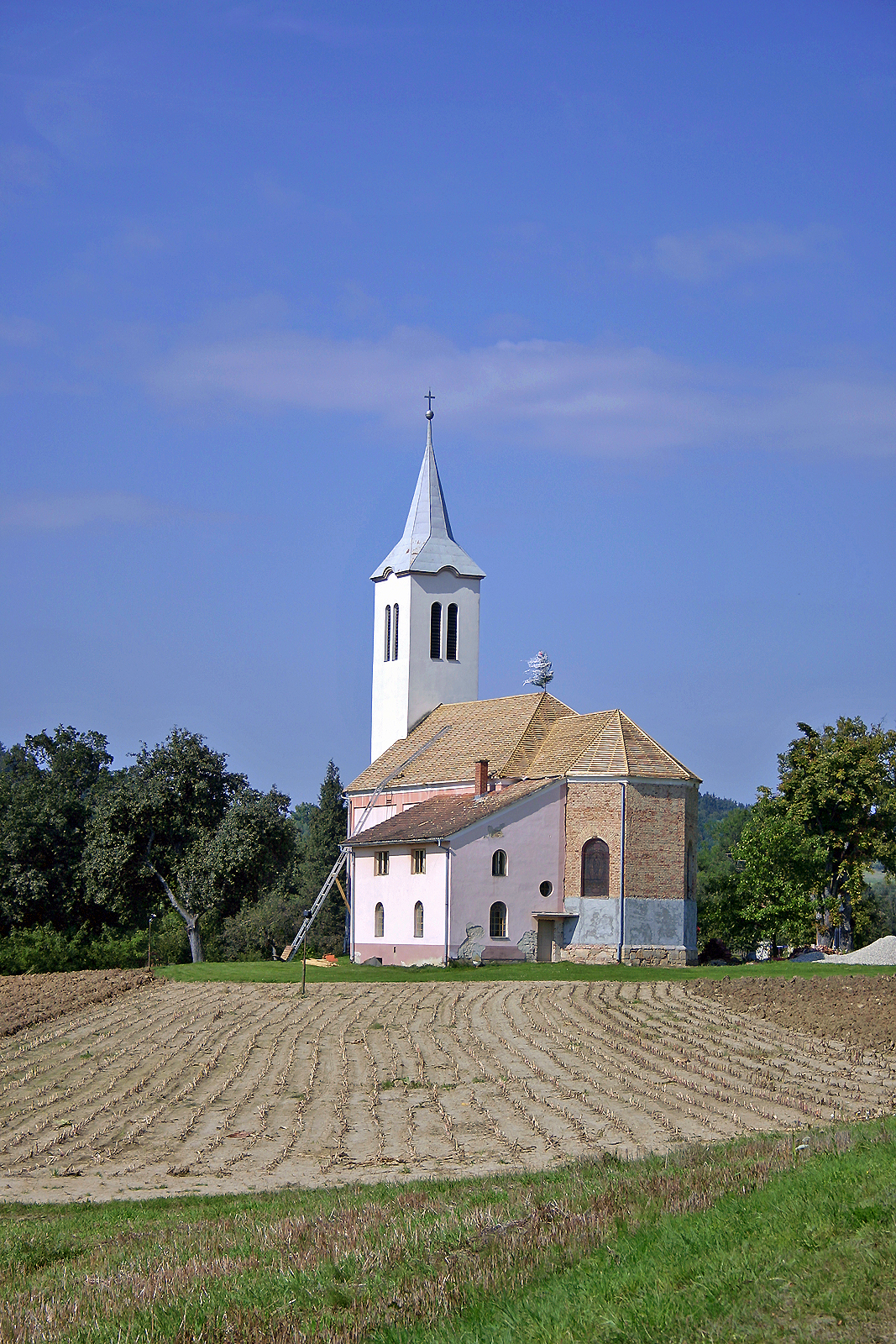 Cerkev Marijinega obiskanja, Markovci. Mary visitation church, Markovci. Mariä Heimsuchung Kirche, Markovci.